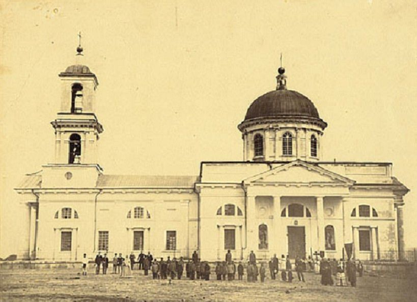 храм в станице Калитвенская Ростовская область